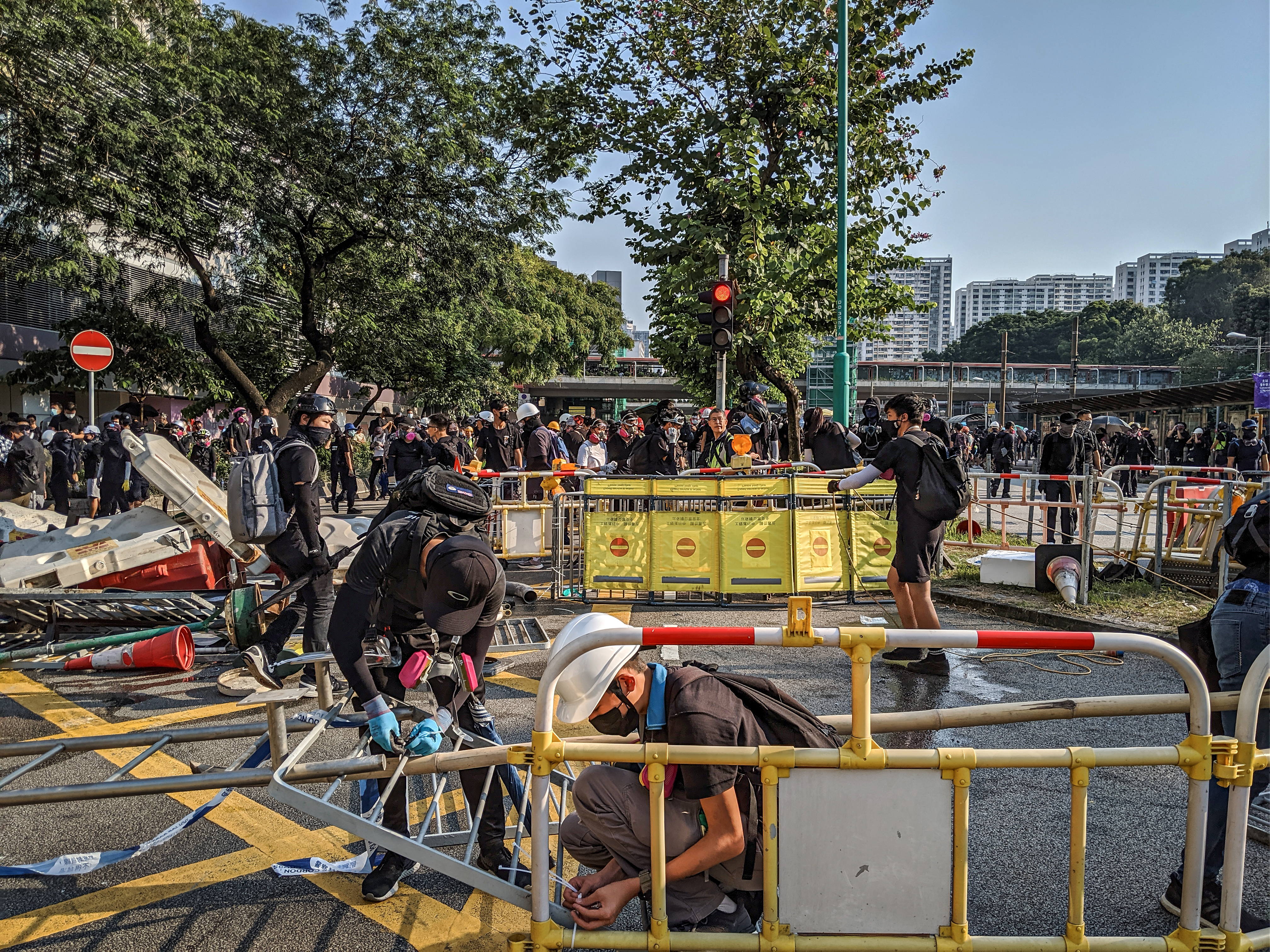 2019-09-22 Tuen Mun 光復屯門公園遊行